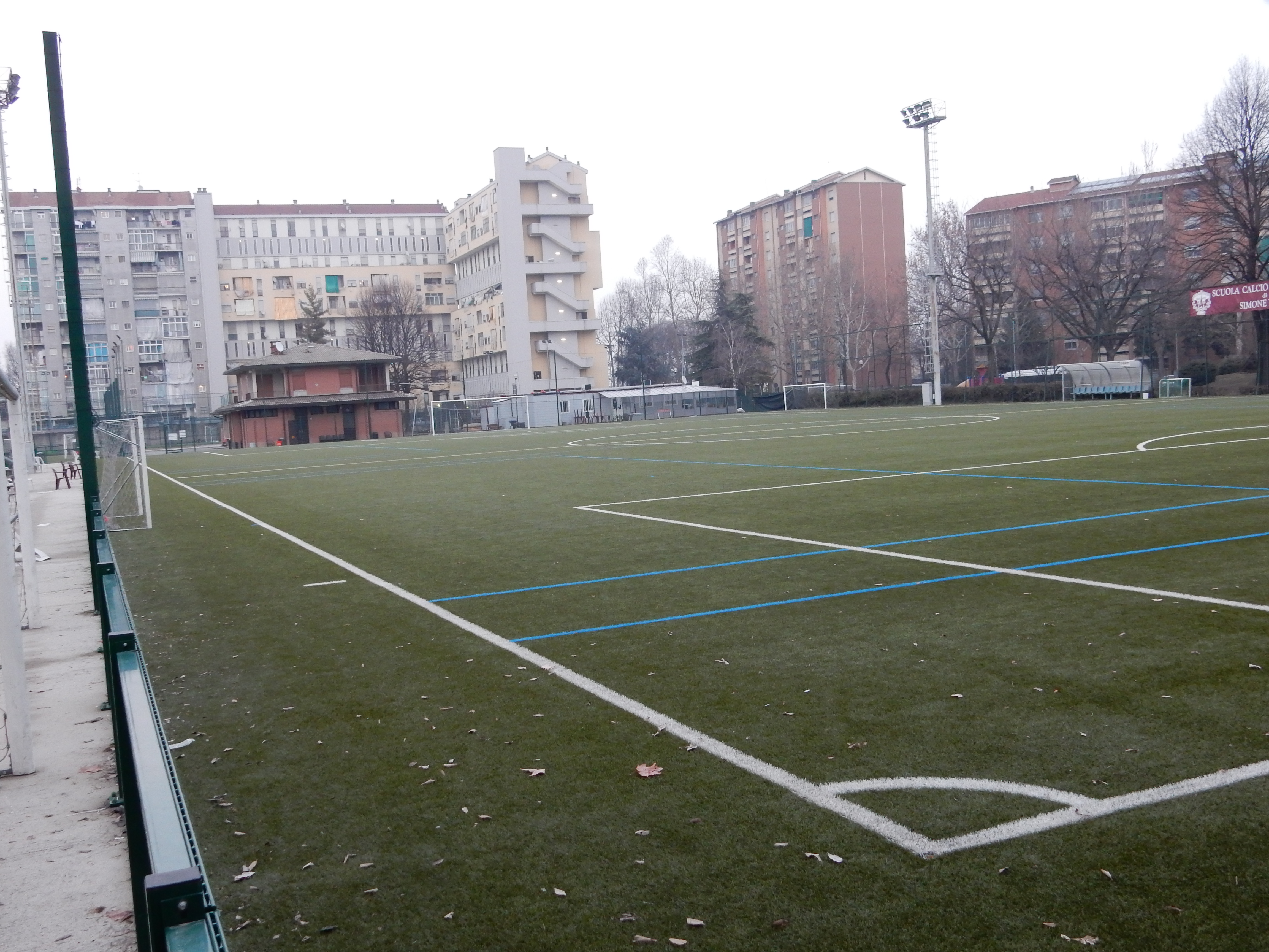 Veduta campo Scuola Calcio via Pergolesi